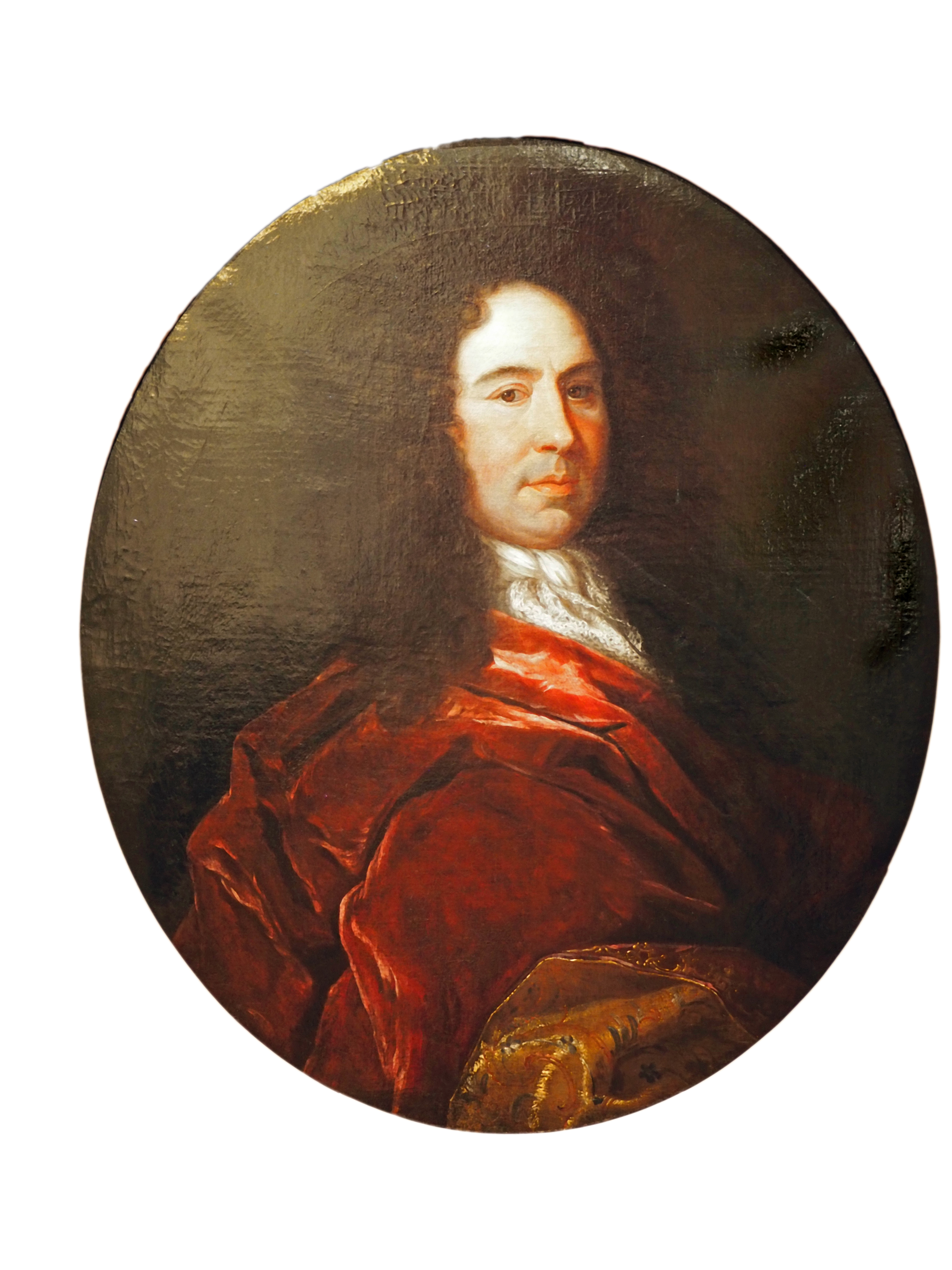 Christoph Chappuzeau (1656-1734, Kammersekrätar von Herzog Georg Wilhelm (Braunschweig-Lüneburg)